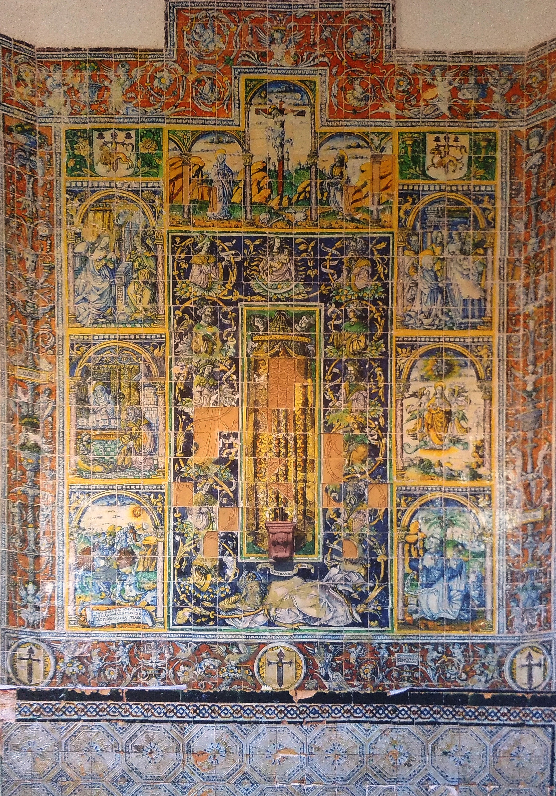 Monasterio de Tentudía, Badajoz, España, Retablo mayor, Francisco Niculoso Pisano, XVI